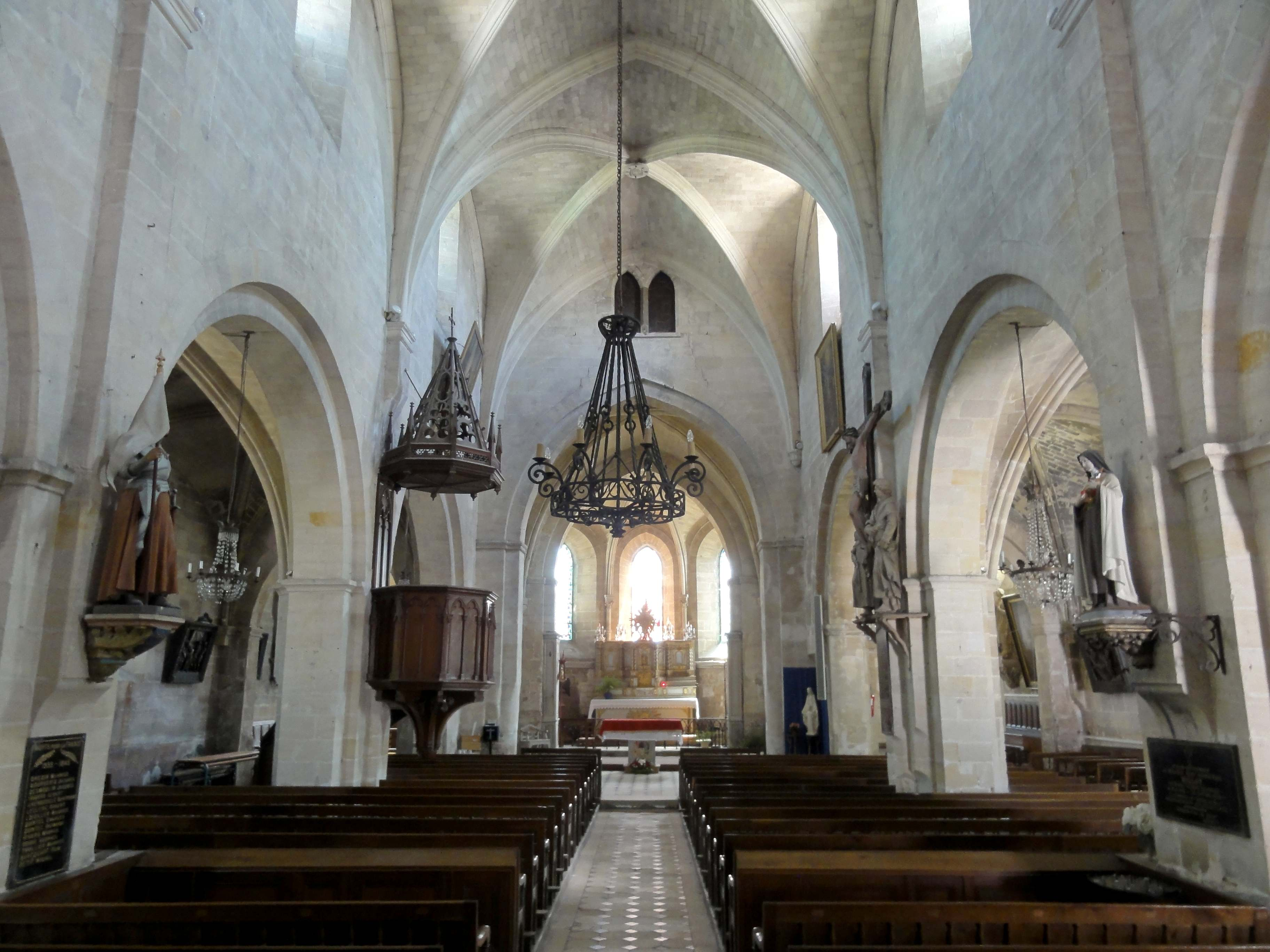 Nef, vue vers l'est.